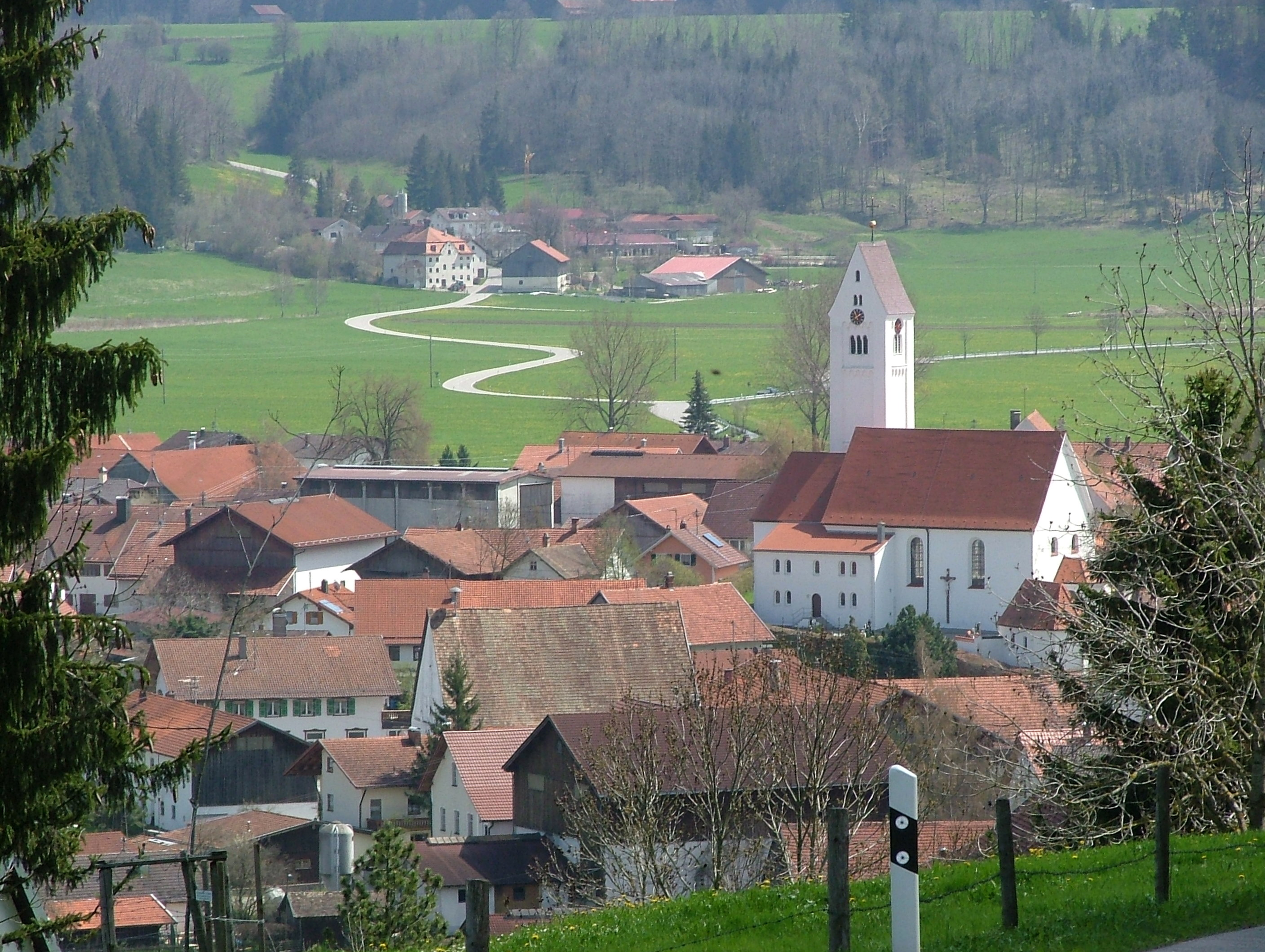 Eggenthal